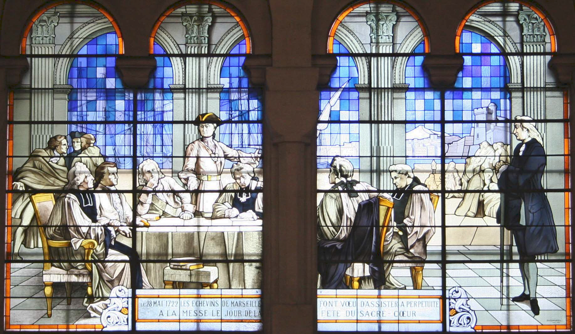 Vitrail de la basilique du Sacré-cœur à Marseille représentant le vœu des échevins formulé en 1722 pendant l'épidémie de peste (baie 12). Inscription :N° V - Le 28 mai 1722 les échevins de Marseille font vœu d'assister à perpétuité à la messe le jour de la fête du Sacré-Coeur Signature H Pinta.